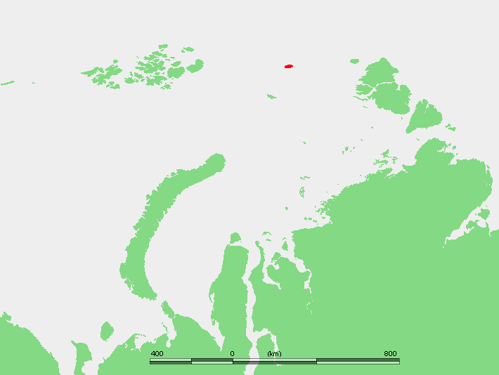 Остров Ушакова, Россия